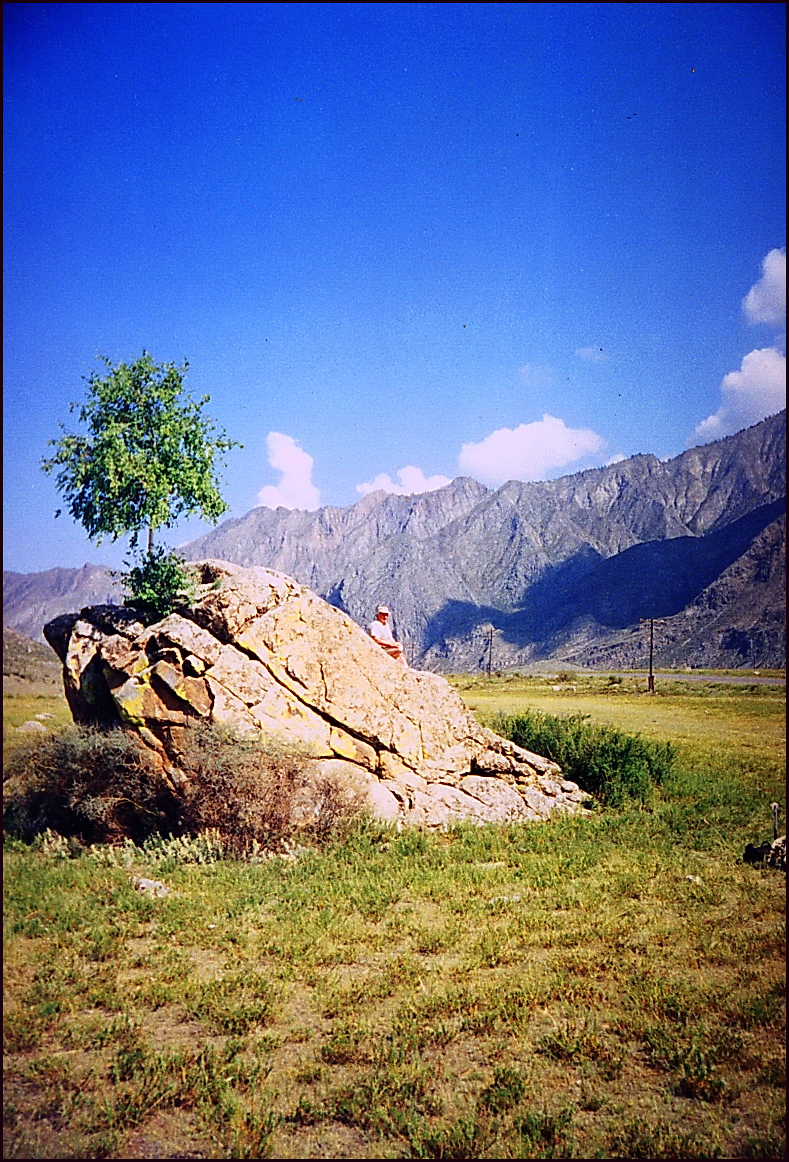 Дилювиальная берма ("каменный сад" на поверхности левобережной террасы р. Катунь) между селами Малый Яломан и Иня.